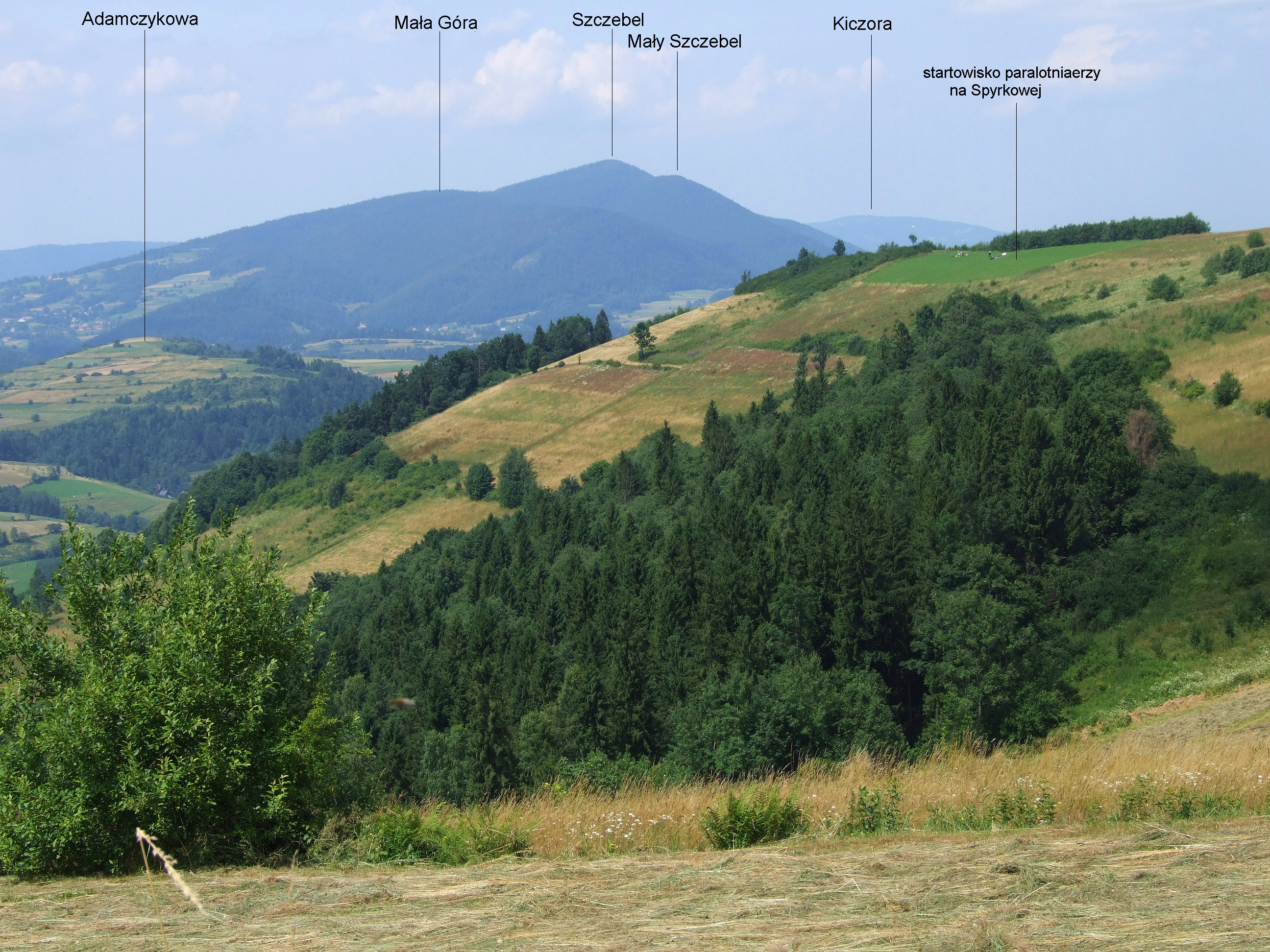 Widok z grzbietu Spyrkowej